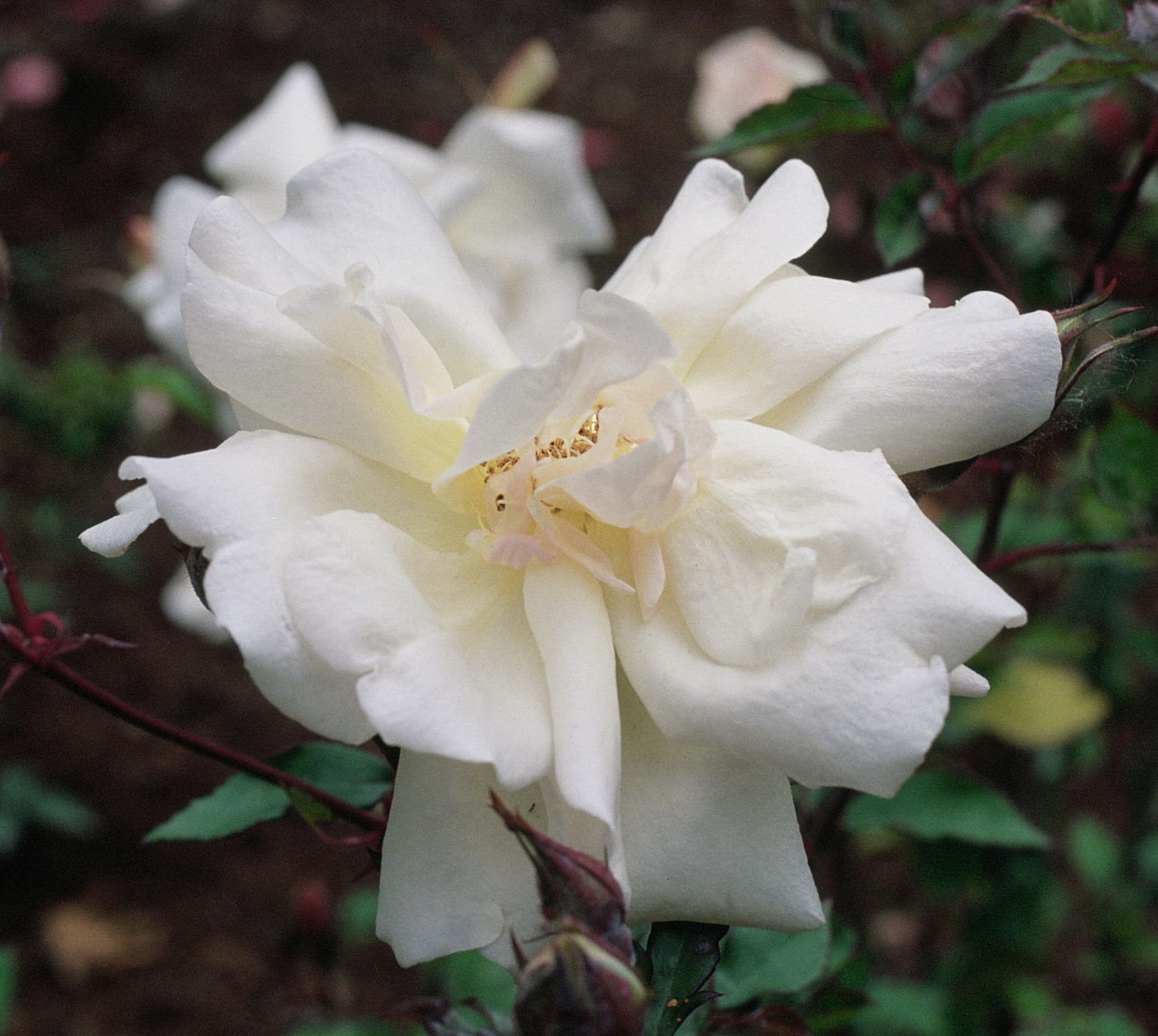 Rosa 'Rival de Paestum', gr. Rosas de te, sect. Chinensis. Real Jardín Botánico, Madrid